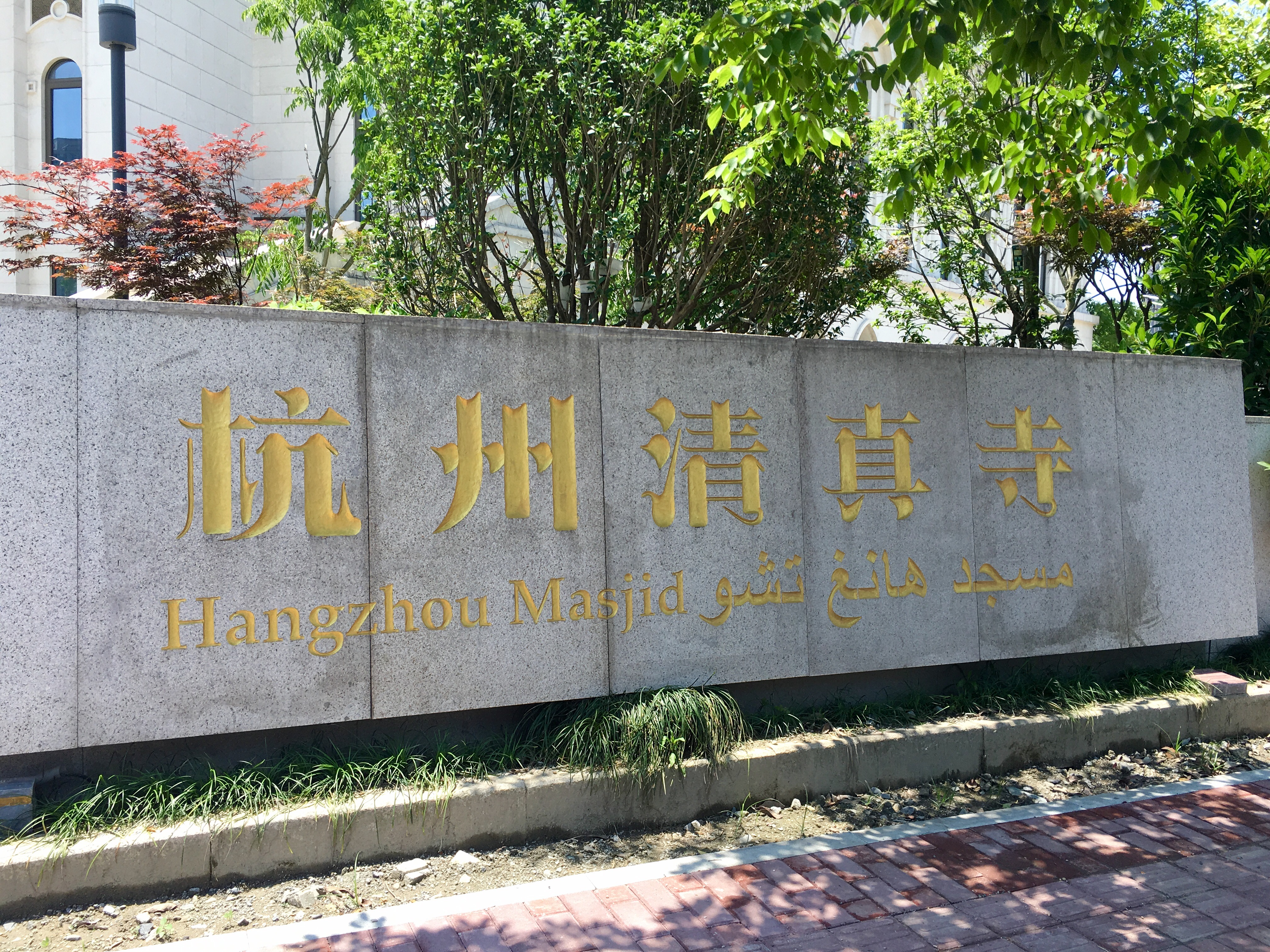 杭州清真寺的大门